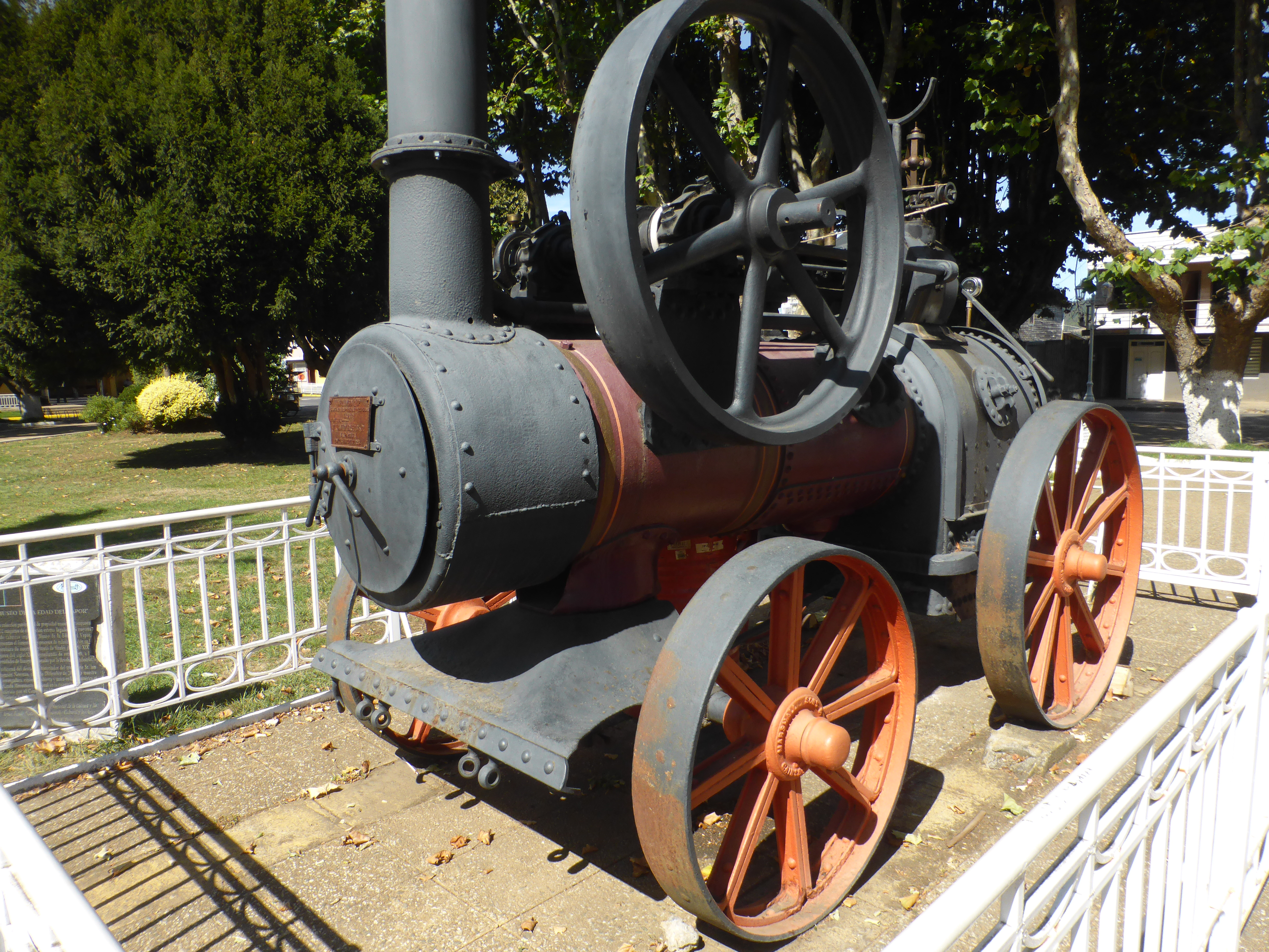 En la Plaza de Armas de la ciudad de Carahue se encuentran dos locomóviles agrícolas, que se encienden y funcionan en algunas fiestas y ferias. Este locomóvil fue fabricado por: "MARSHALL, Sons & C°. Limited", Britannia Ironworks, en Gainsborough (Lincolnshire), Inglaterra.